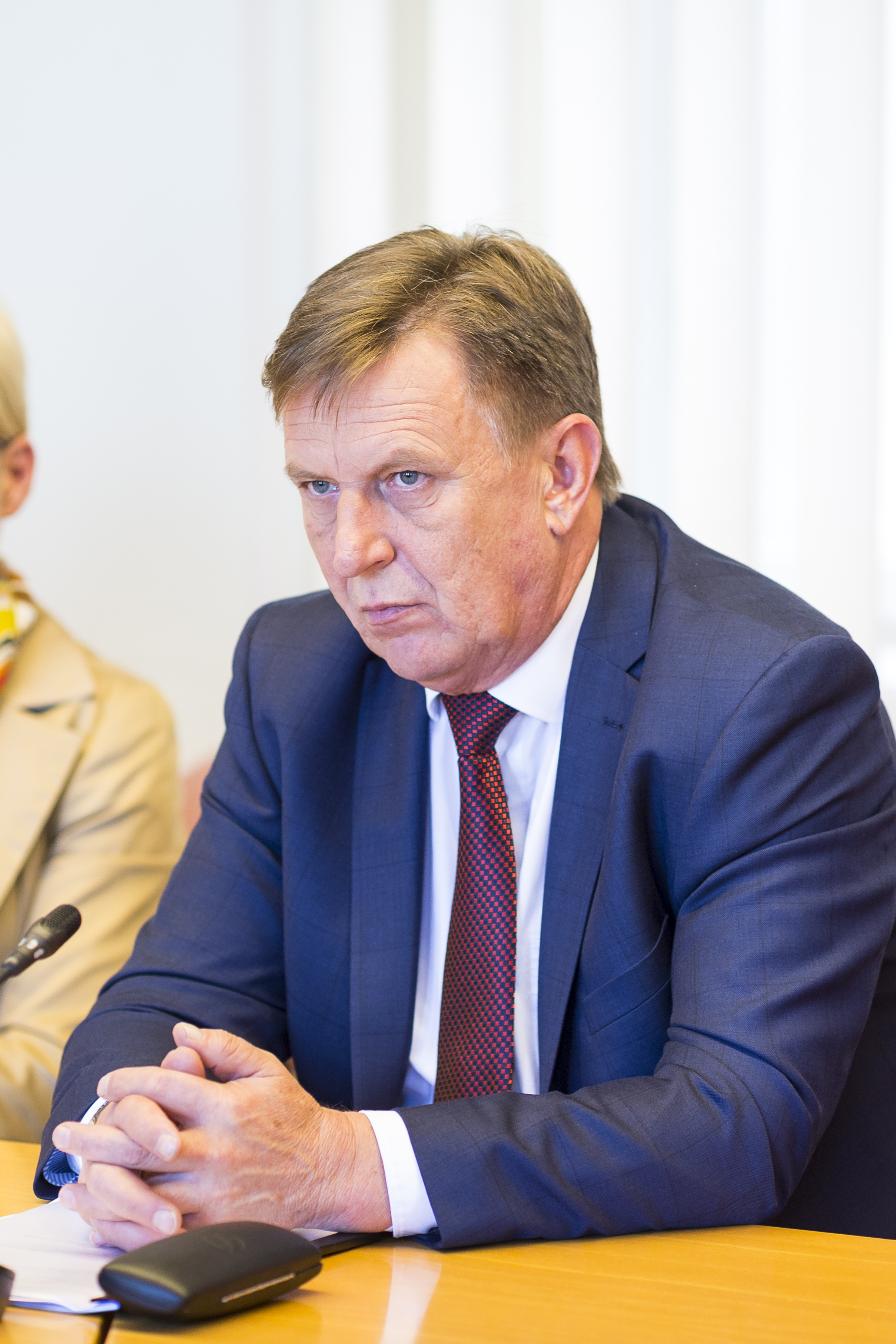 2016.gada 31.augusts. Baltijas Asamblejas Latvijas delegācijas un Saeimas Ārlietu komisijas Baltijas lietu apakškomisijas tikšanās ar premjerministru Māri Kučinski. Foto: Reinis Inkēns, Saeimas Administrācija Izmantošanas noteikumi: saeima.lv/lv/autortiesibas